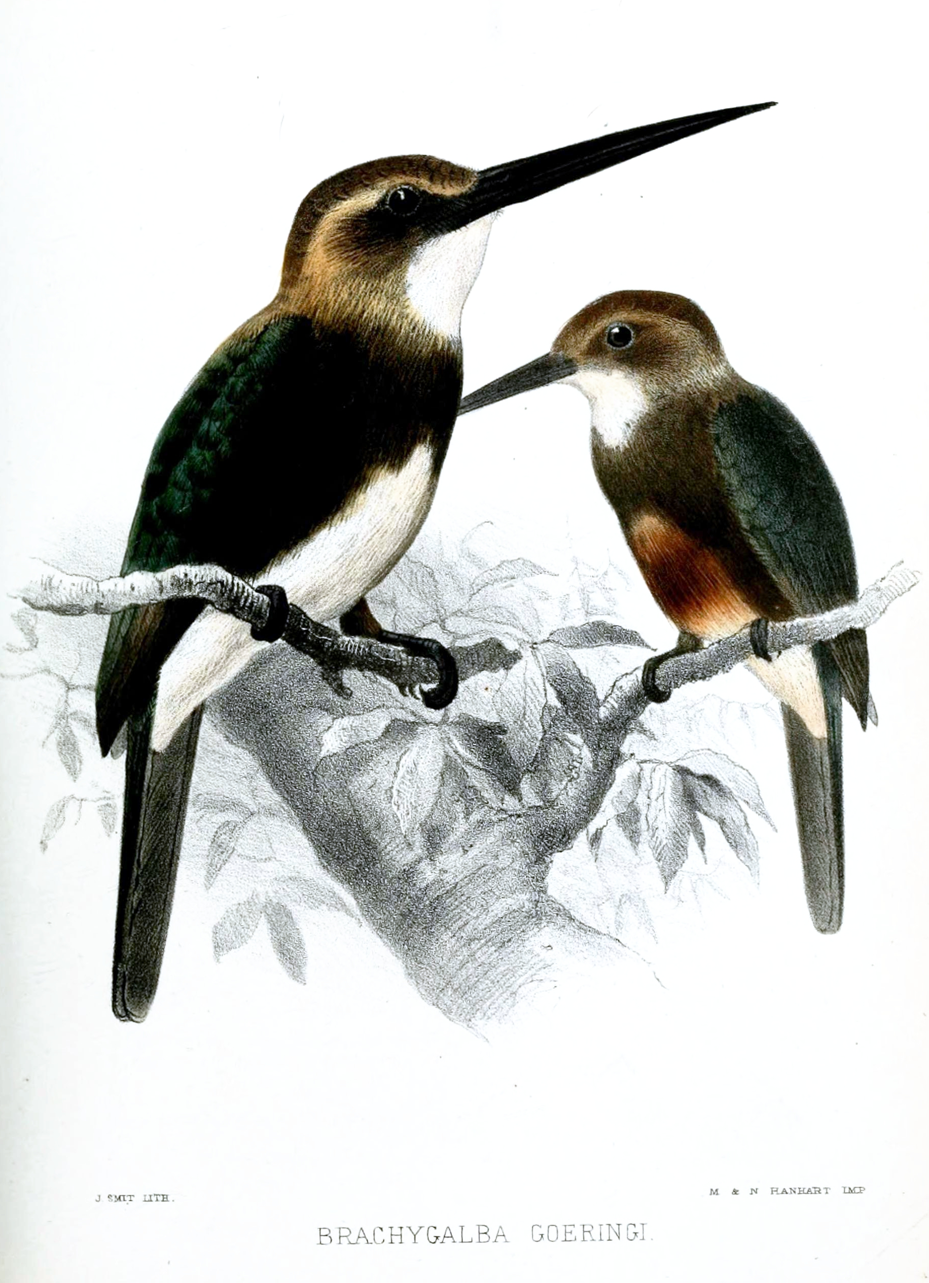 Brachygalba goeringi